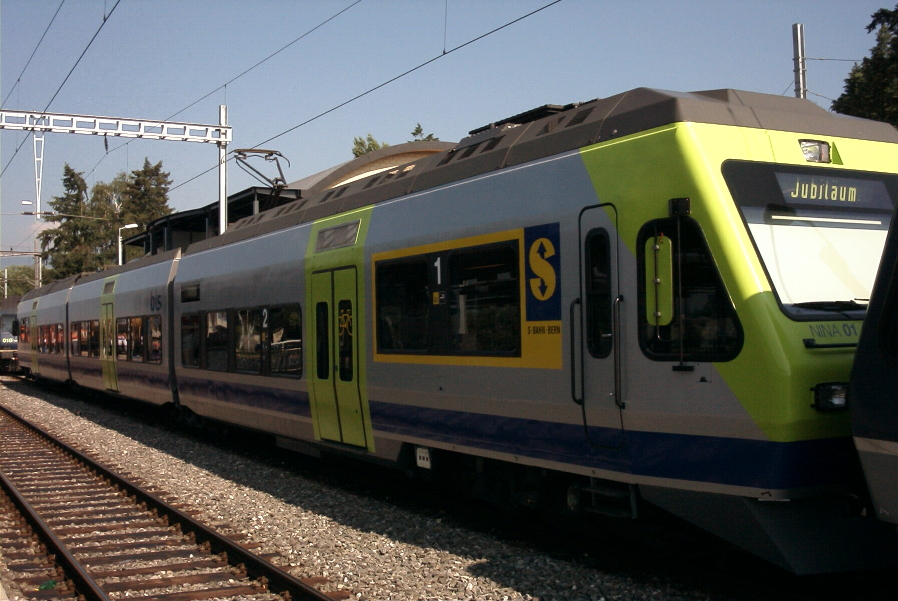 BLS RABe 525 001 "NINA 01" bei der Präsentation des Neuanstrichs in Ins; with new livery in Ins